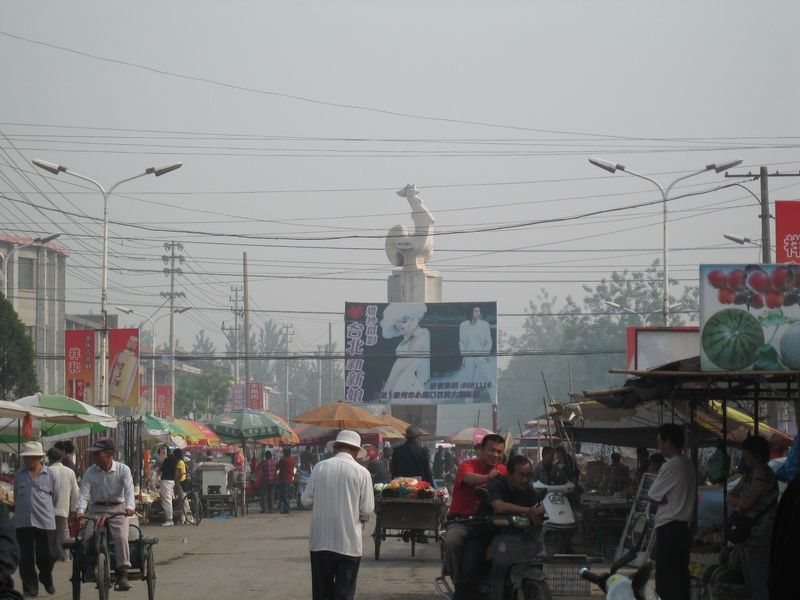 SUZHOU FULIJI Rooster sculptures符离集老公鸡